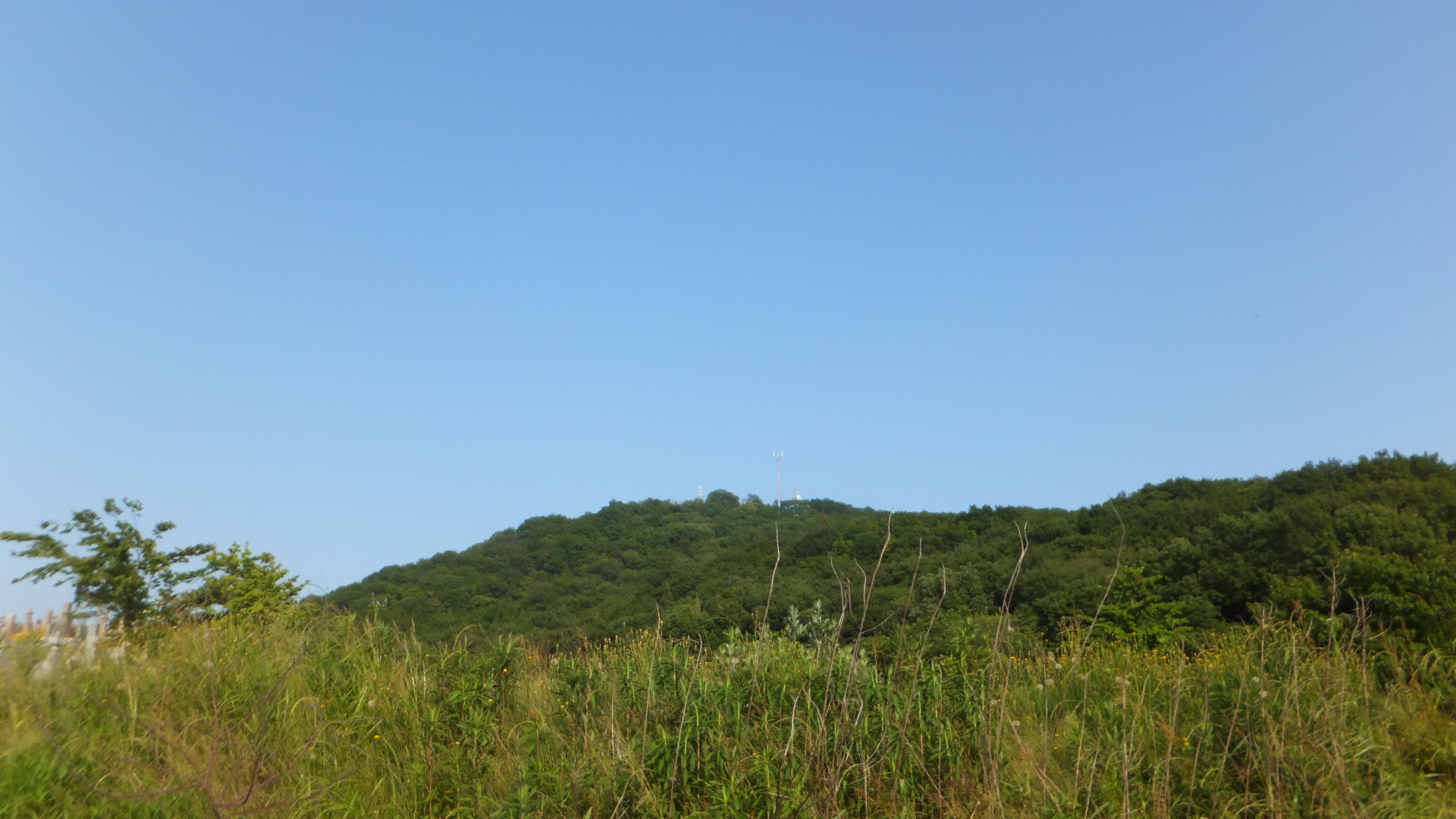 正法寺山（2014年5月28日）